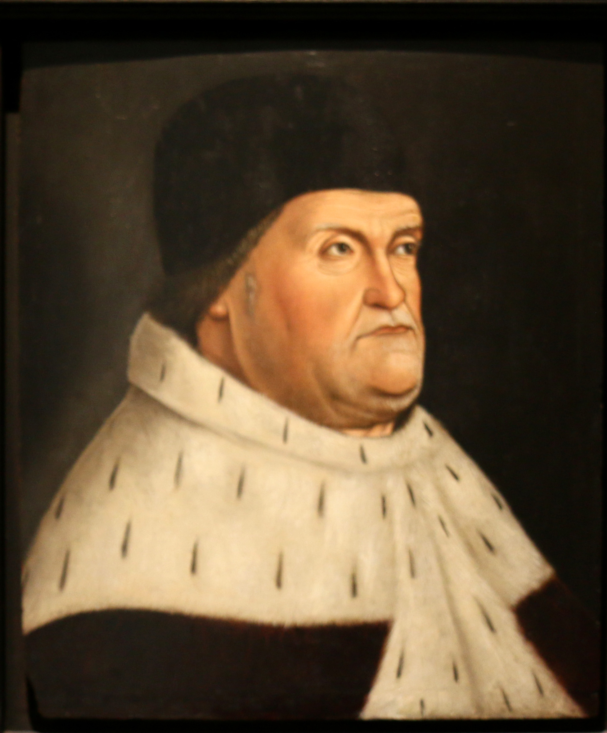 Portrait du roi René au musée d-histoire de Marseille.